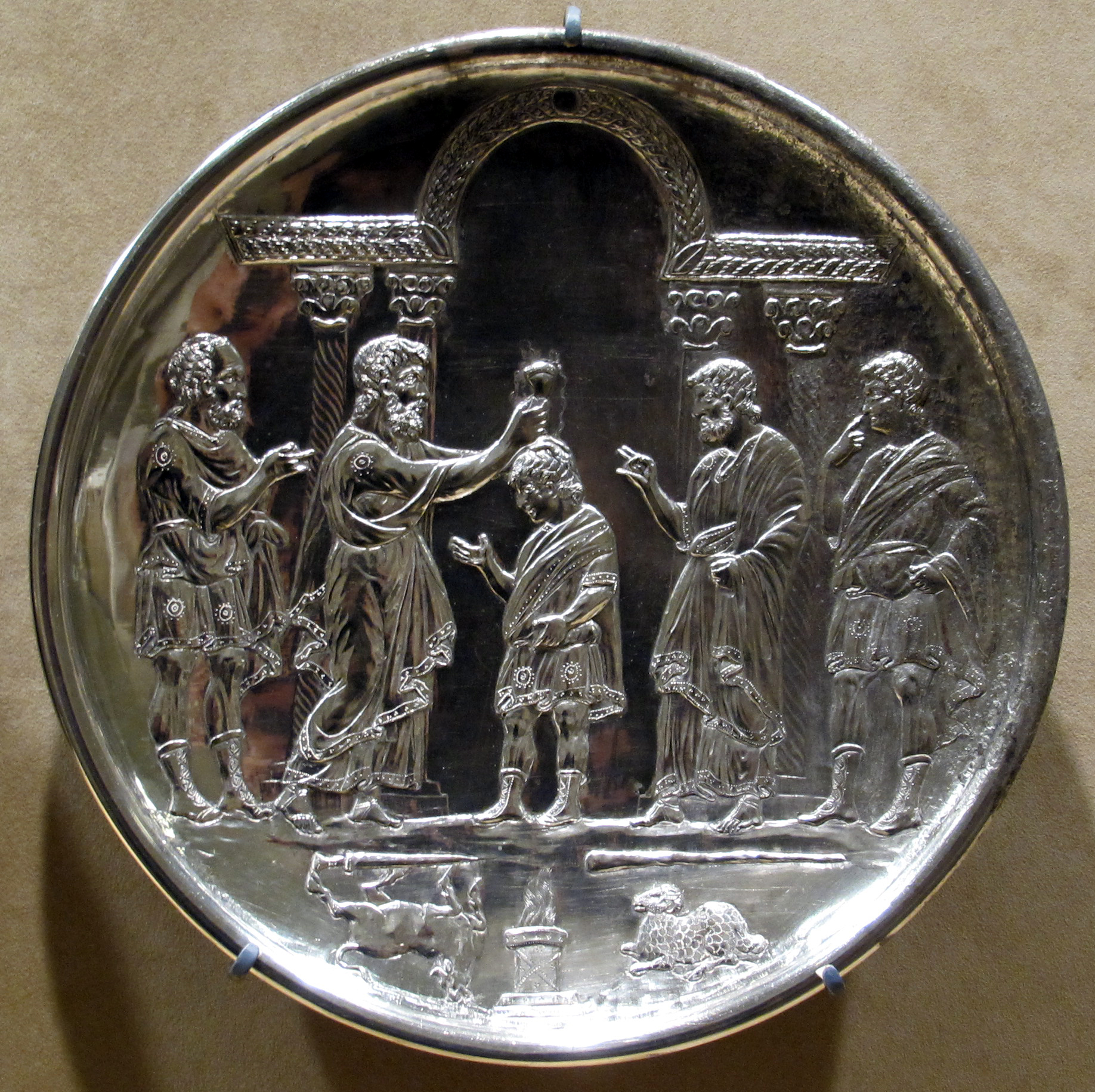 Medieval art in the Metropolitan Museum of Art